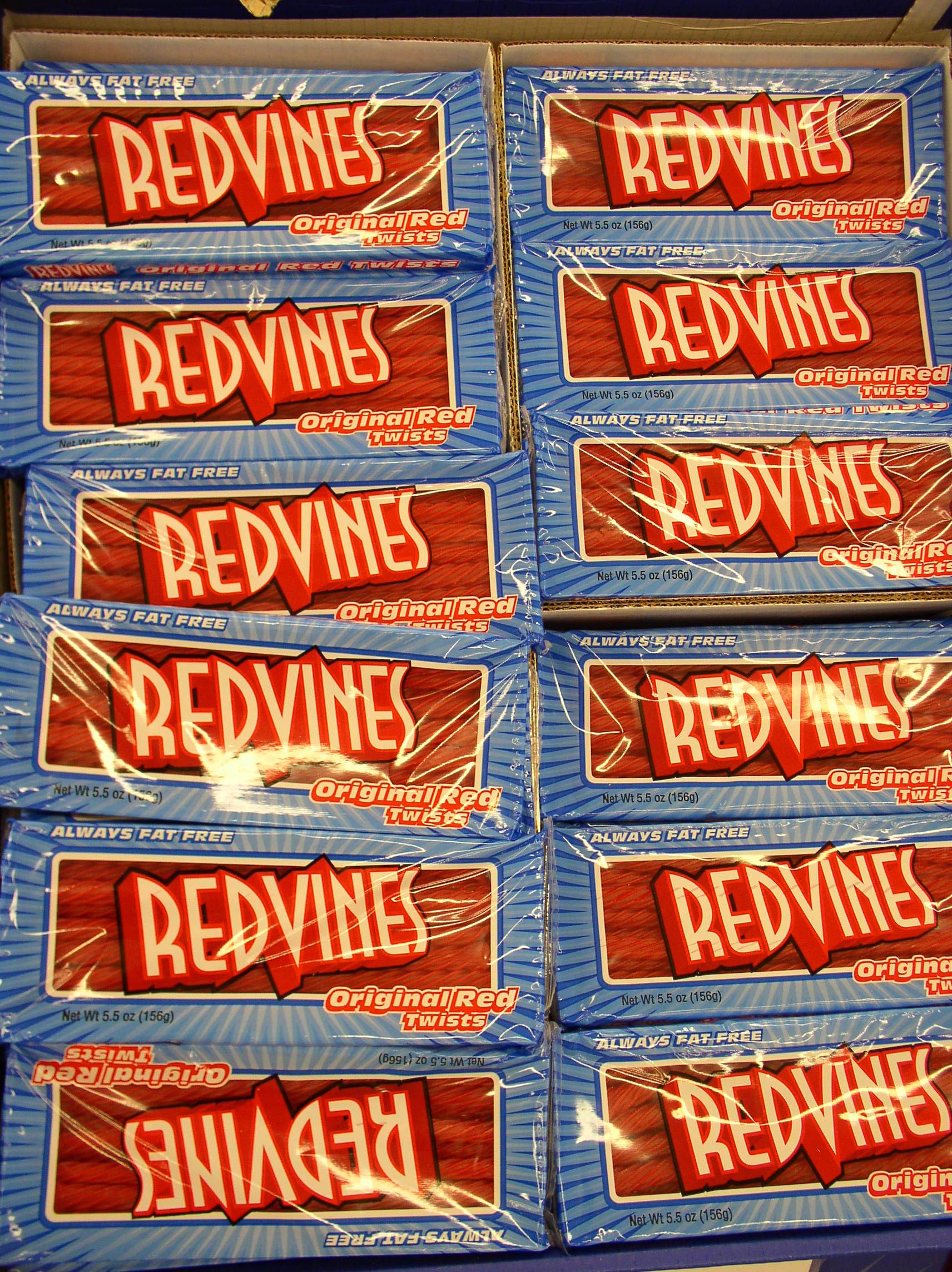 no hatin' yo!